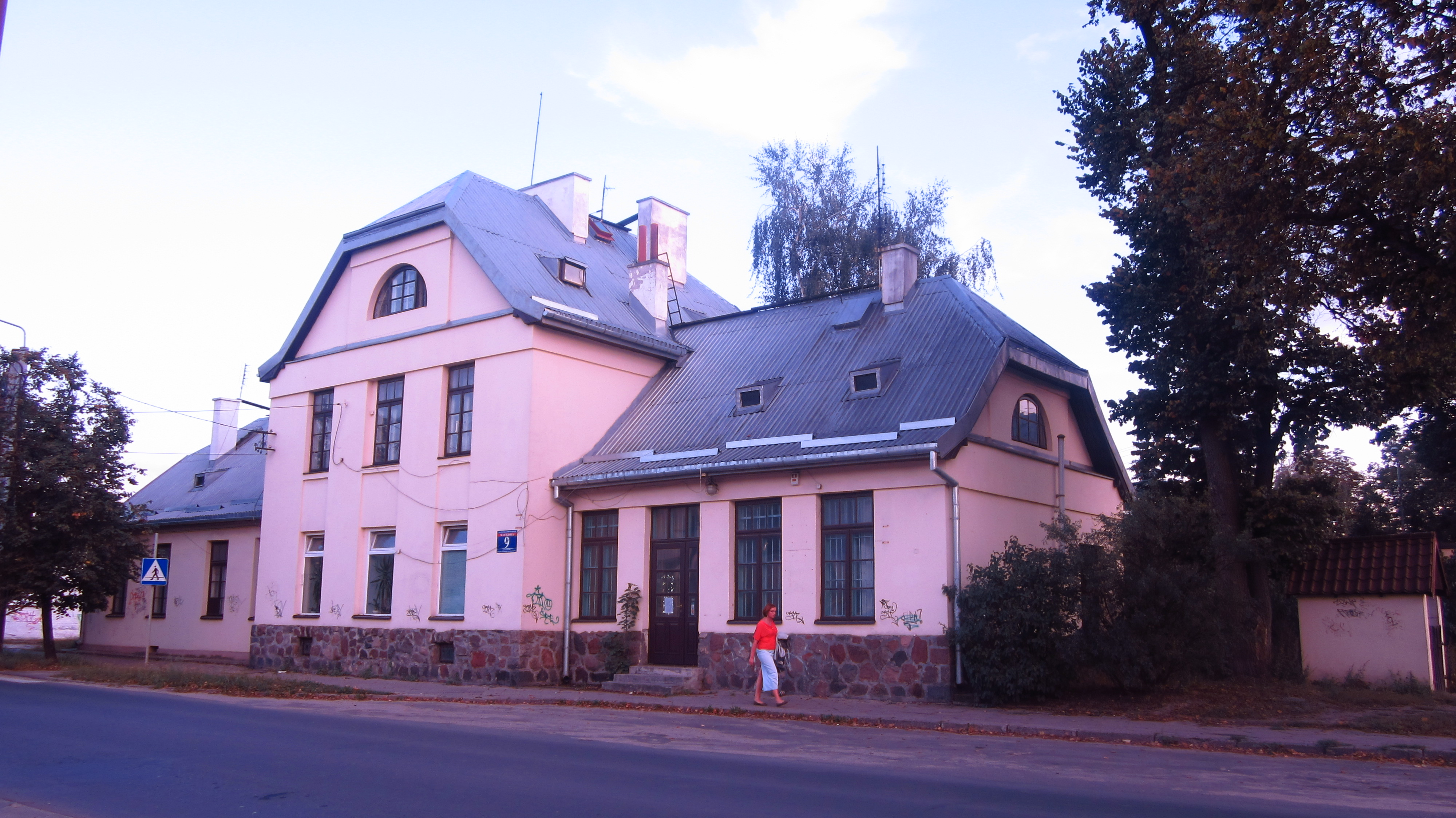 d. dworzec kolejki wąskotorowej, pocz. XX w. Otwock ul. Wawerska 9 A, Otwock 06.1997.